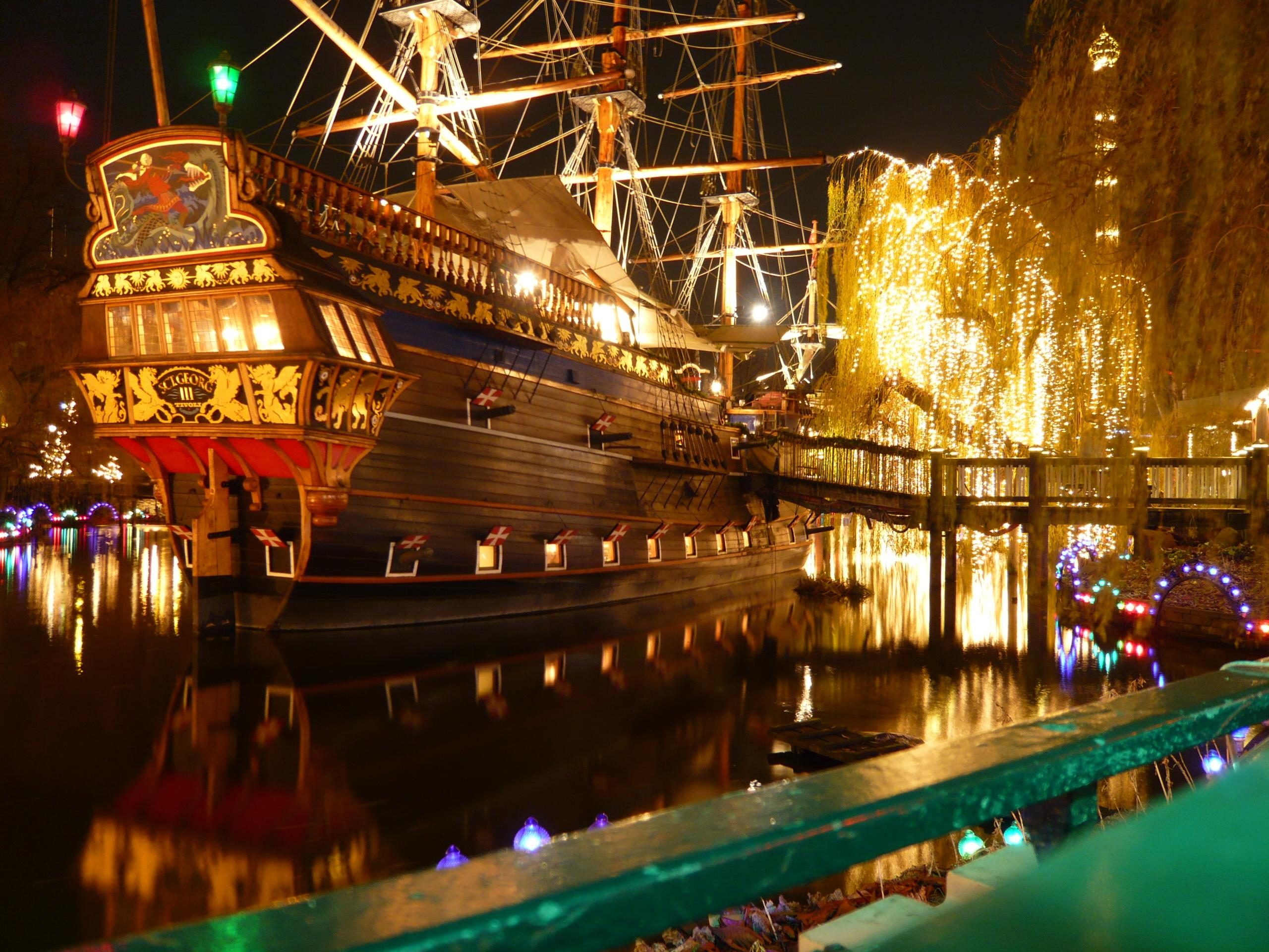 O Tívoli de Copenhague coa decoración de Nadal